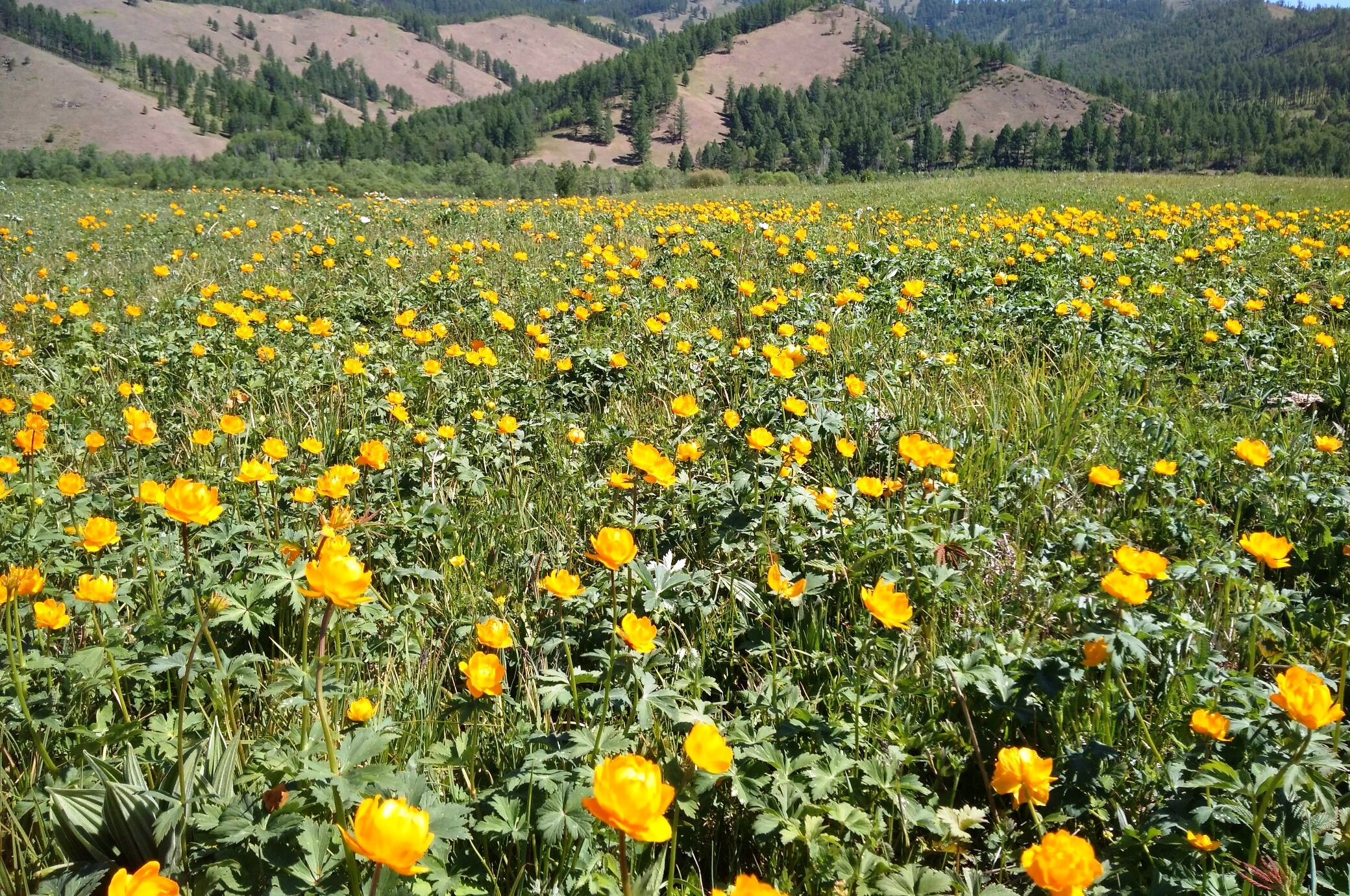 Жарки на юго-западе Бурятии